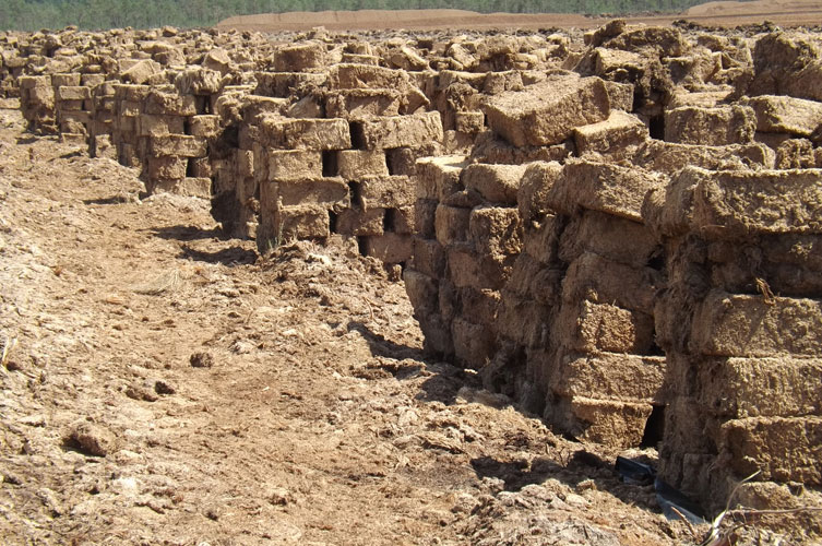 Гальский мох